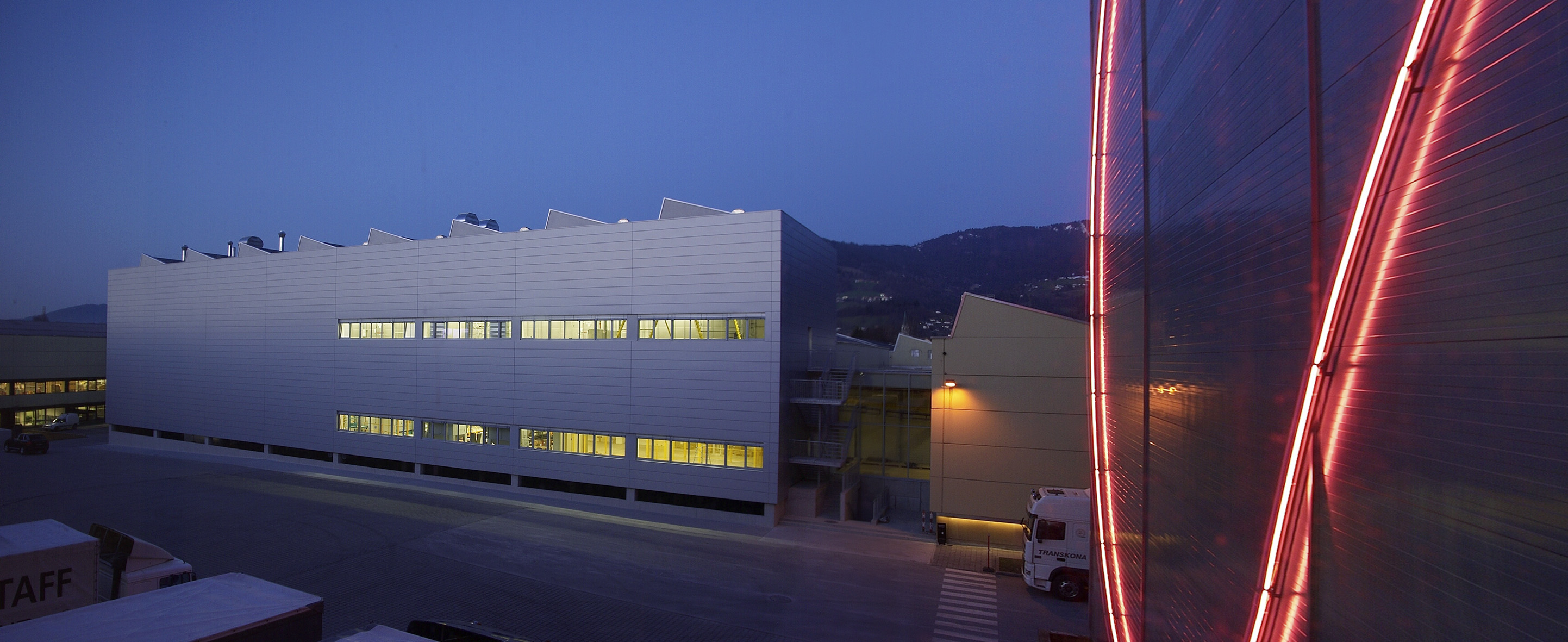 Werk der Zumtobel Group am Standort Schweizerstraße in Dornbirn, Österreich